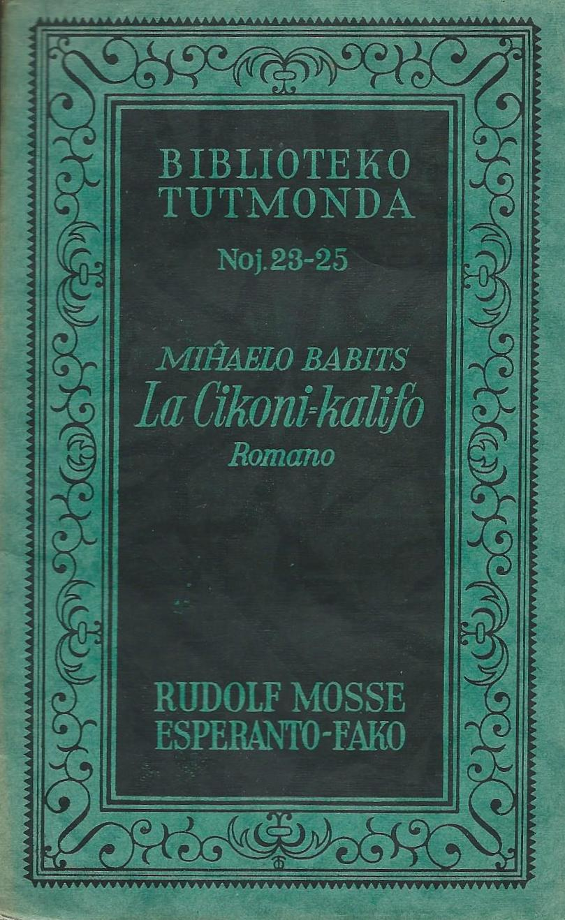 librokovrilo "La Cikoni-kalifo", 1929